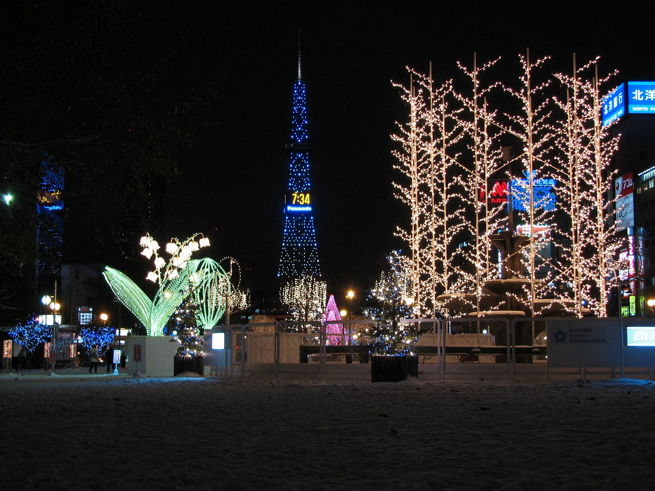 札幌テレビ塔の見える風景